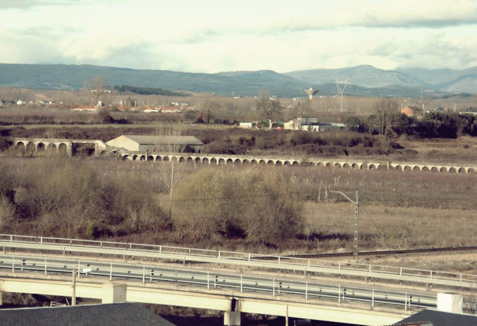 Acequia 20.